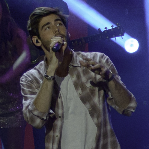 Es un cantante y compositor español, conocido por el éxito de su primer sencillo, El mismo sol, en Europa durante el verano de 2015. Ref: Convention Center, Punta del Este, Uruguay, 24 July 2016 5 6 ISO: 800